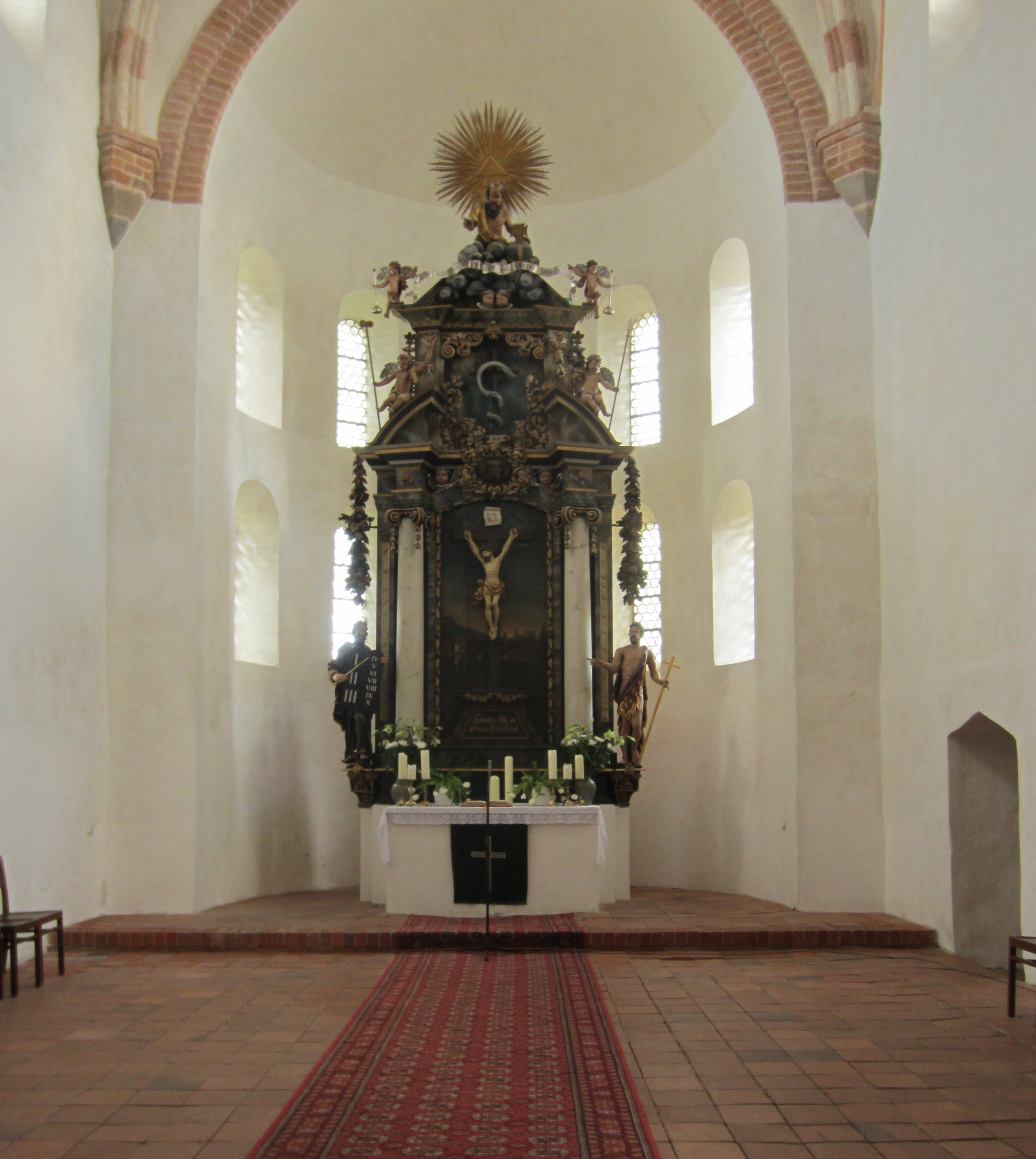 Stadtkirche St. Marien in Treuenbrietzen, Hauptapsis mit Altar